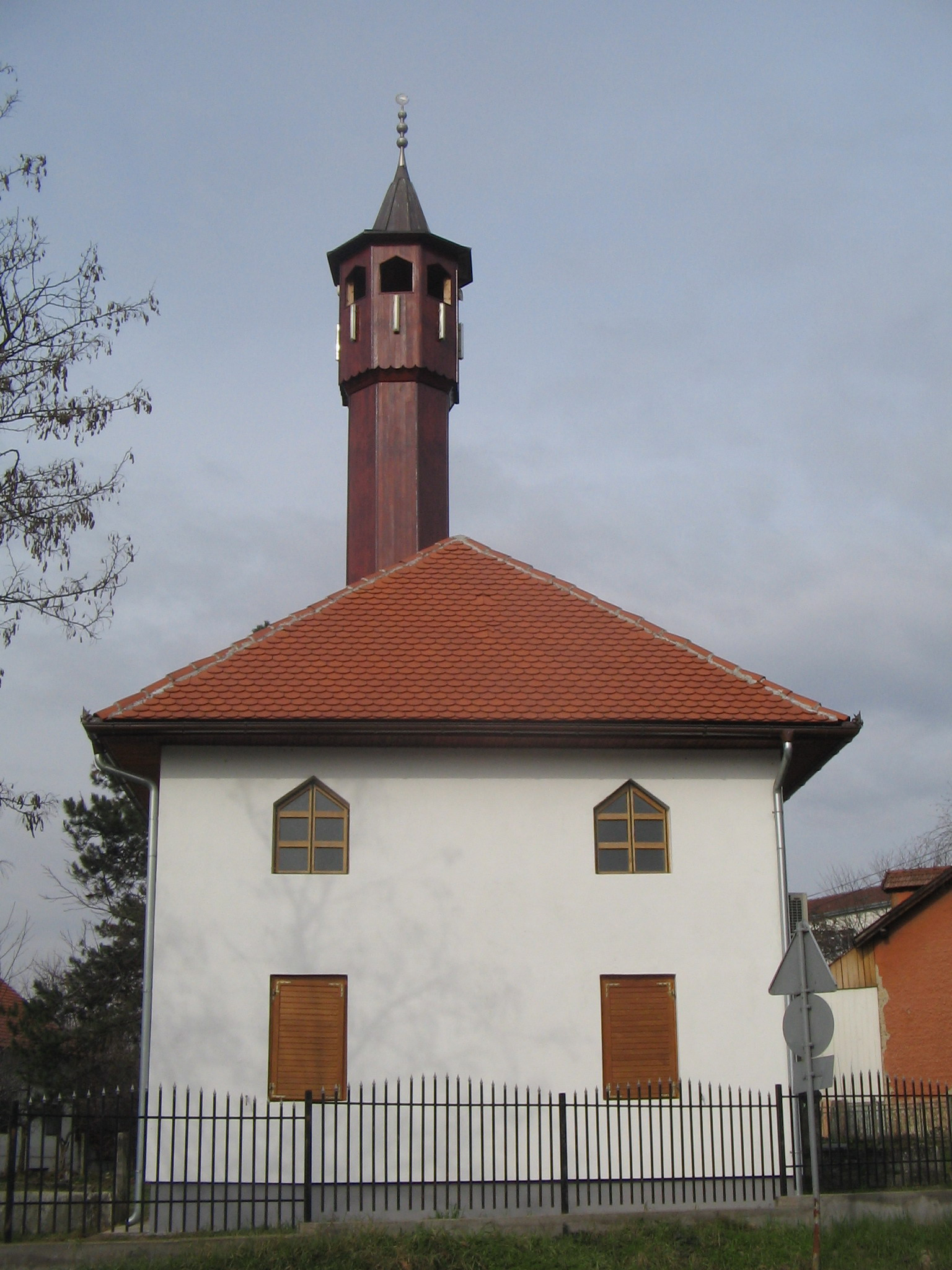 Хаџи Омерова (Долачка) џамија у Бањој Луци